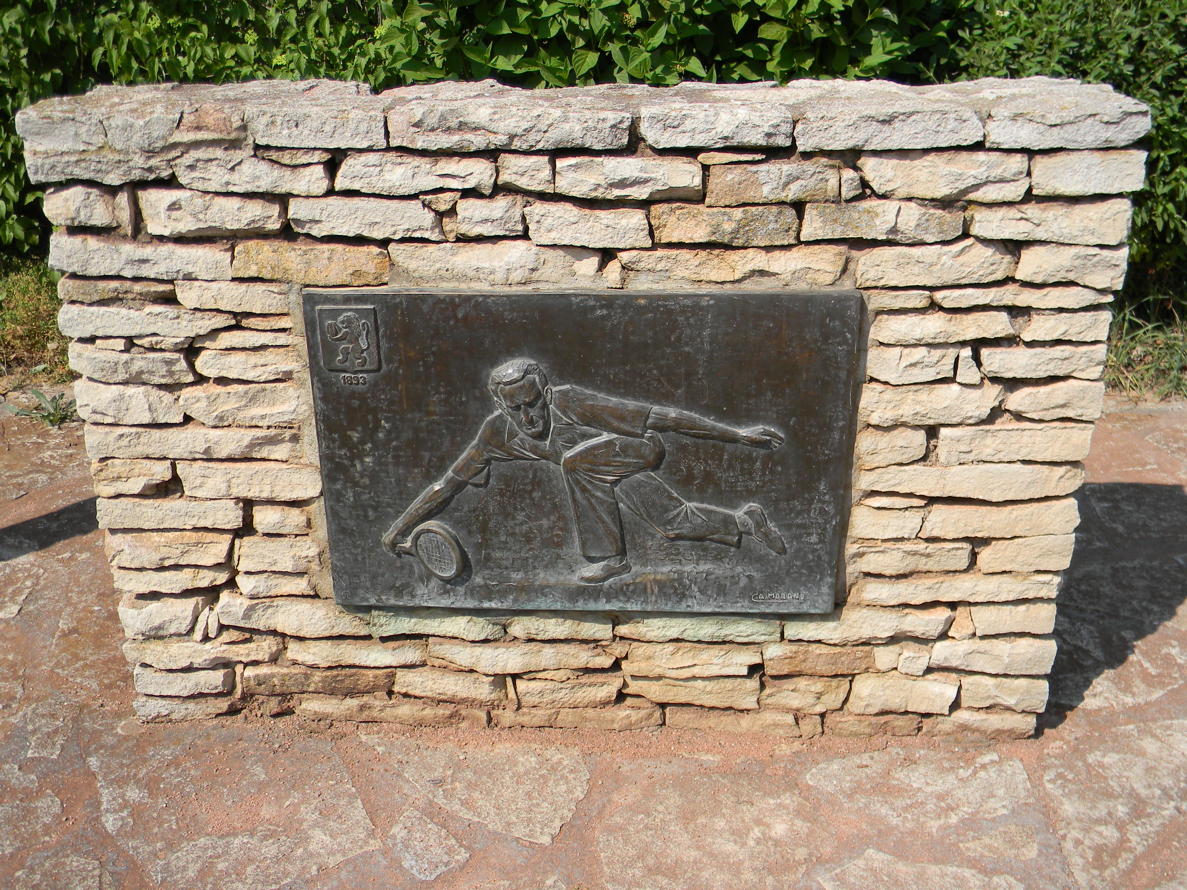 Plaque représentant Henri Cochet